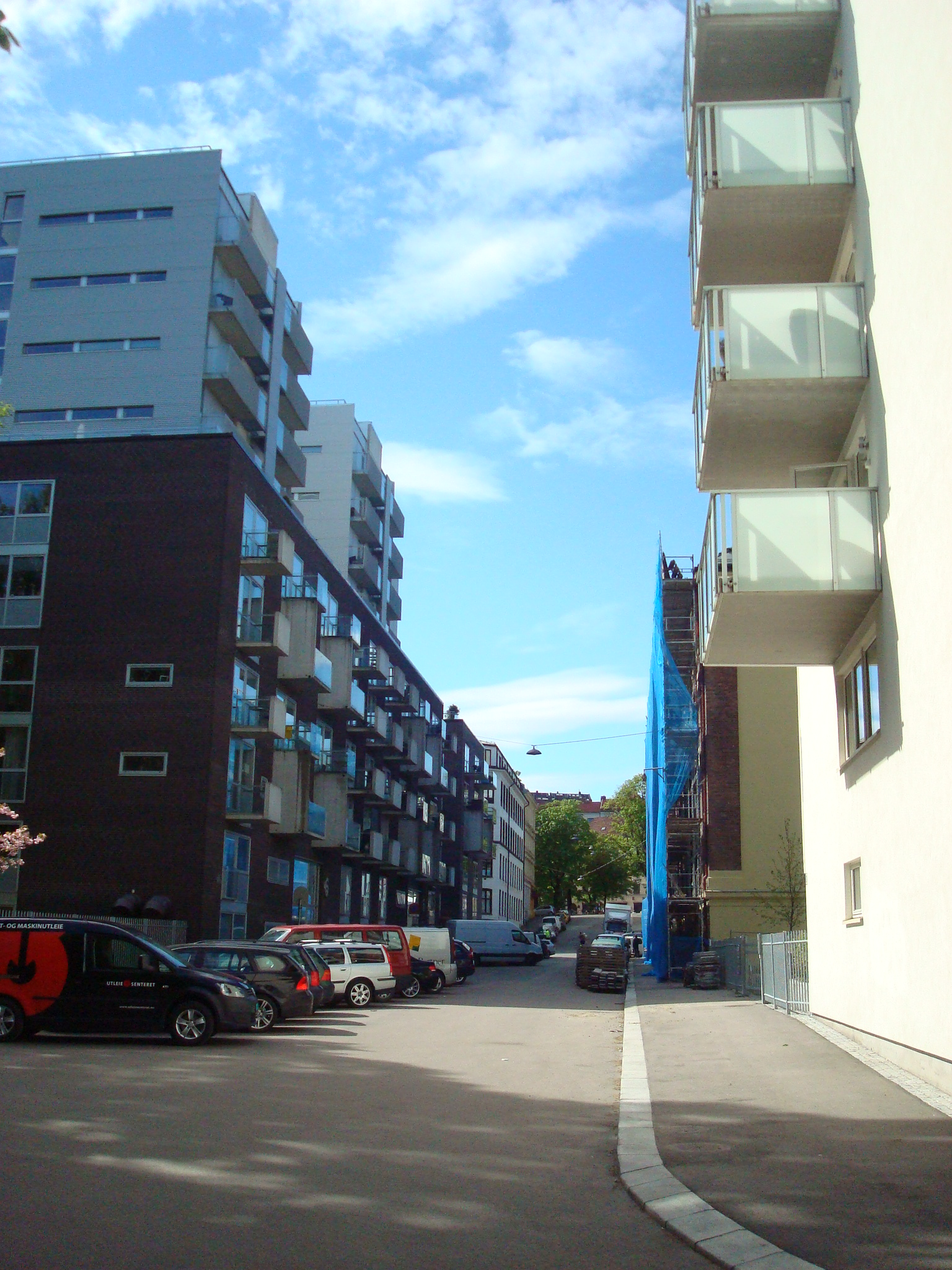 Darres gate i Oslo.